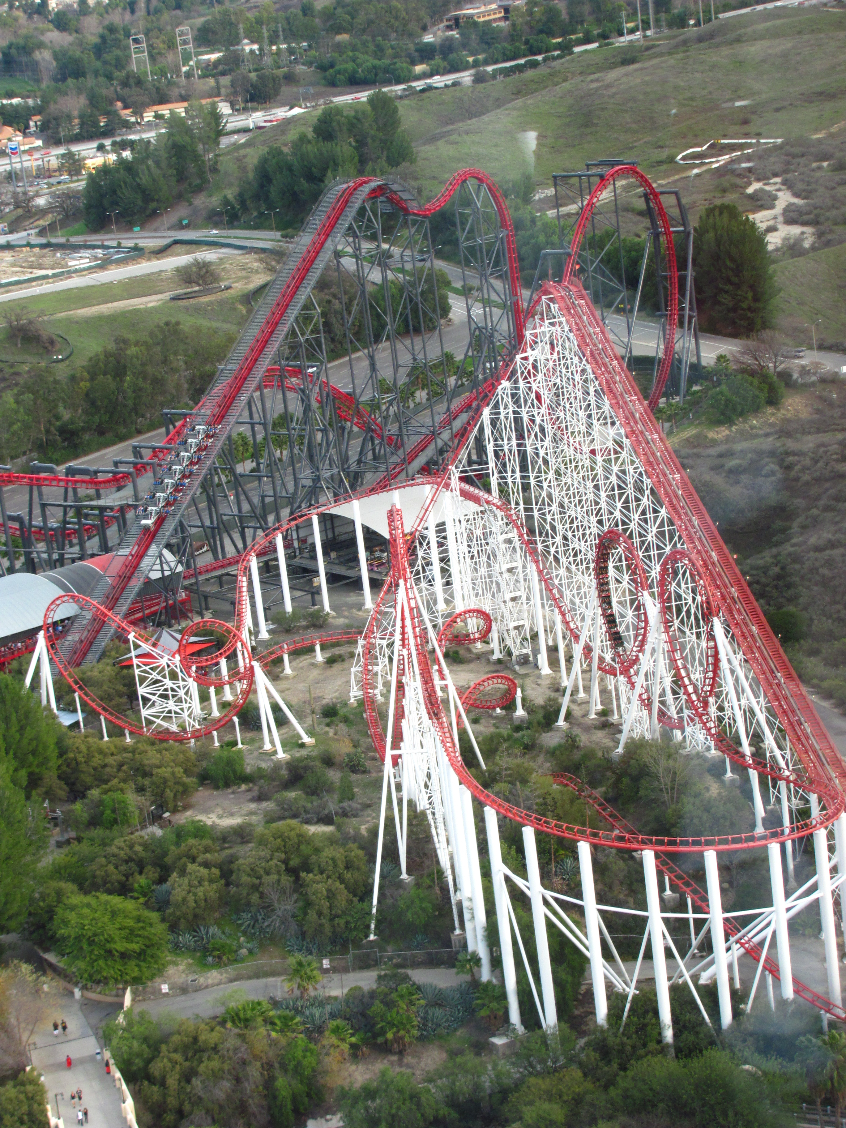 Sky Tower vistas